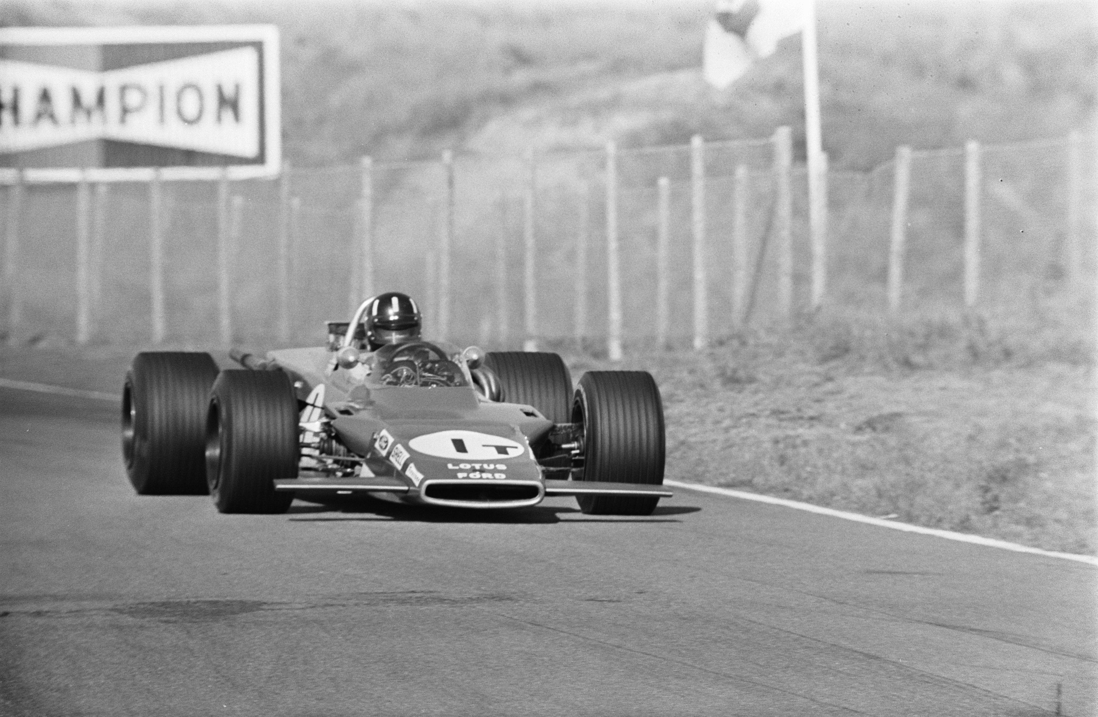 Graham Hill in een Lotus met 4-wiel aandrijving in actie op de eerste trainingsdag.